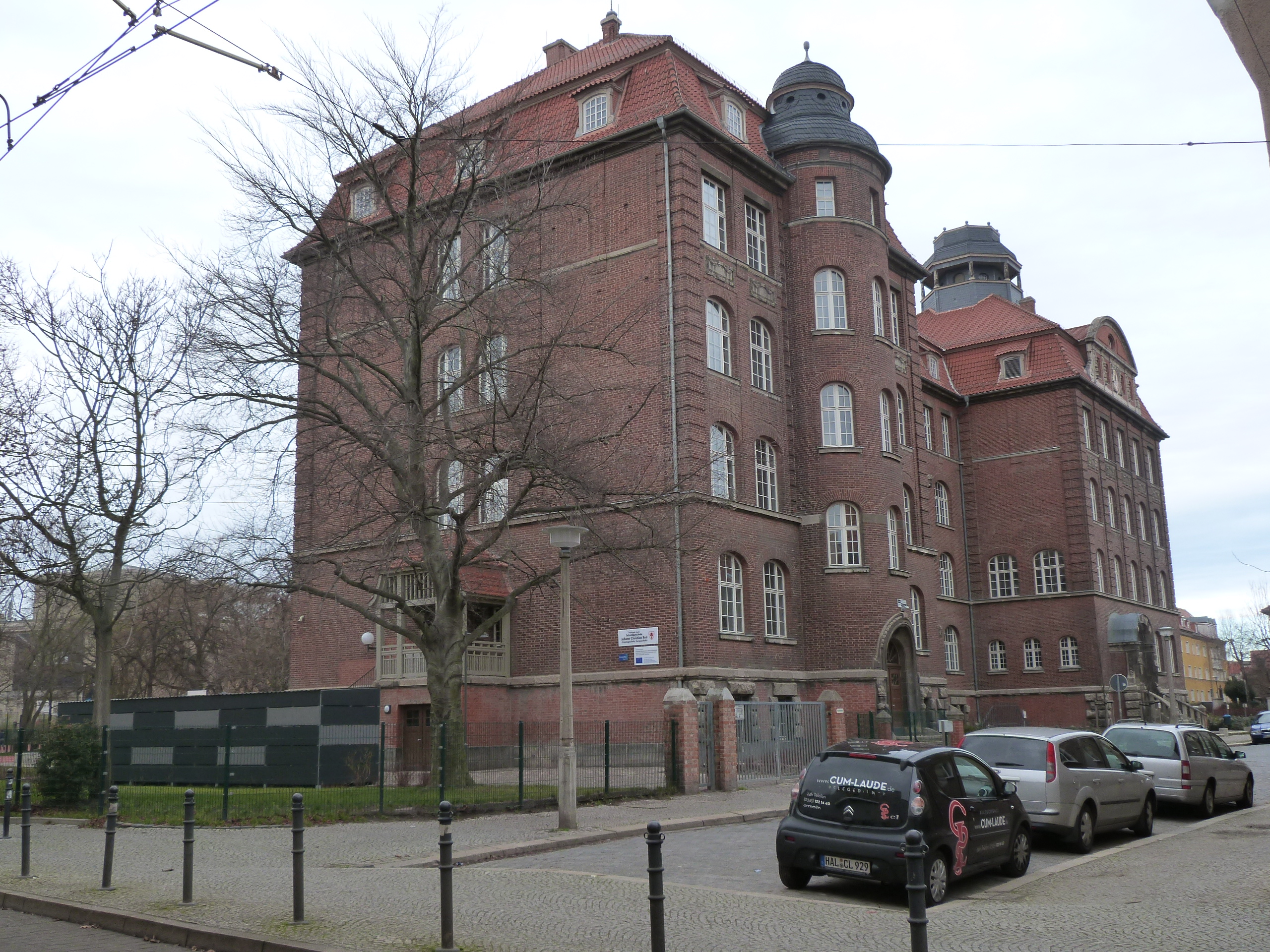 Sekundarschule "Johann Christian-Reil", erbaut 1905-1908 als Städtische Oberrealschule, Ernst-Schneller-Straße 1, Halle (Saale)